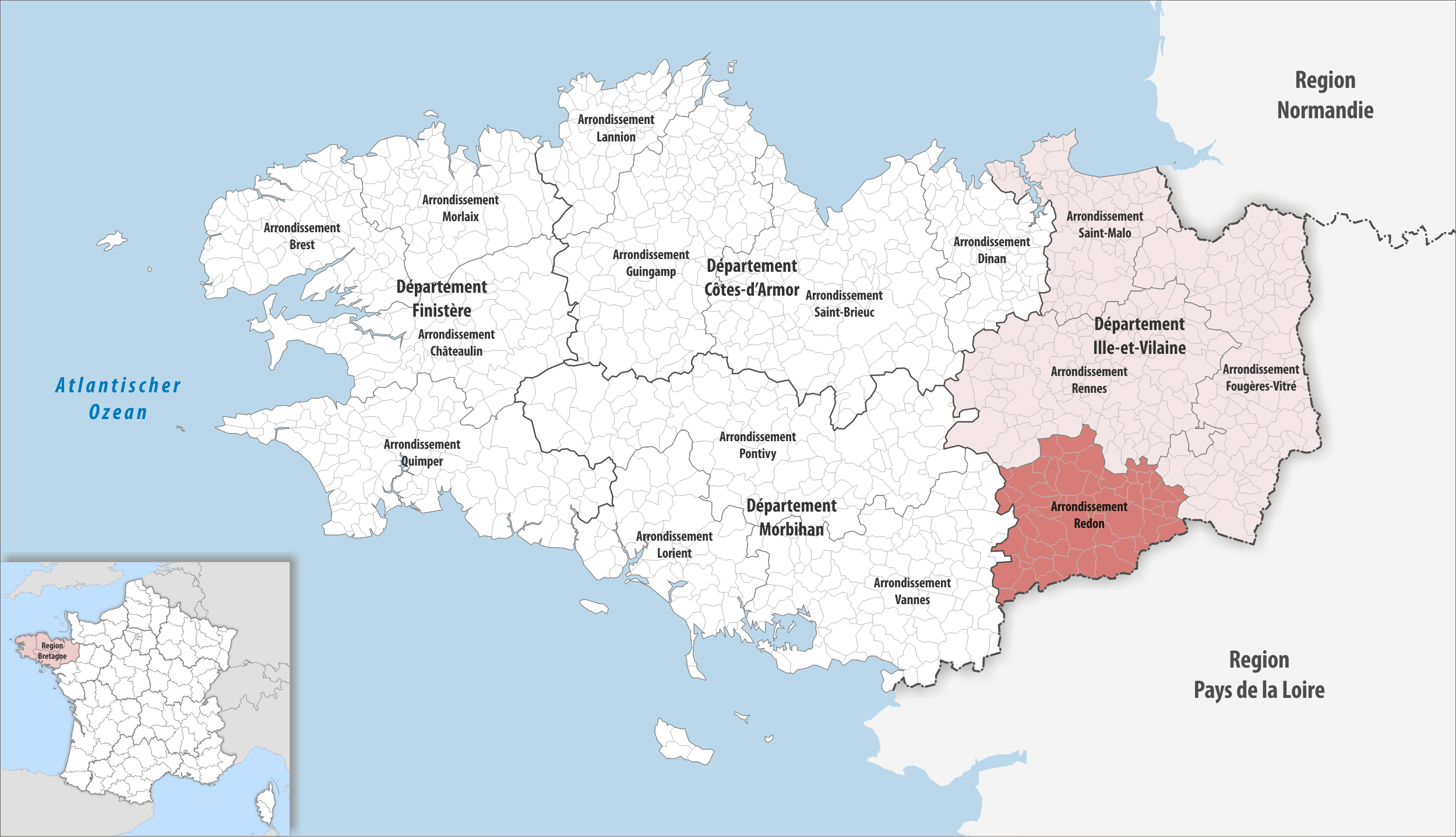 Lage des Arrondissements Redon